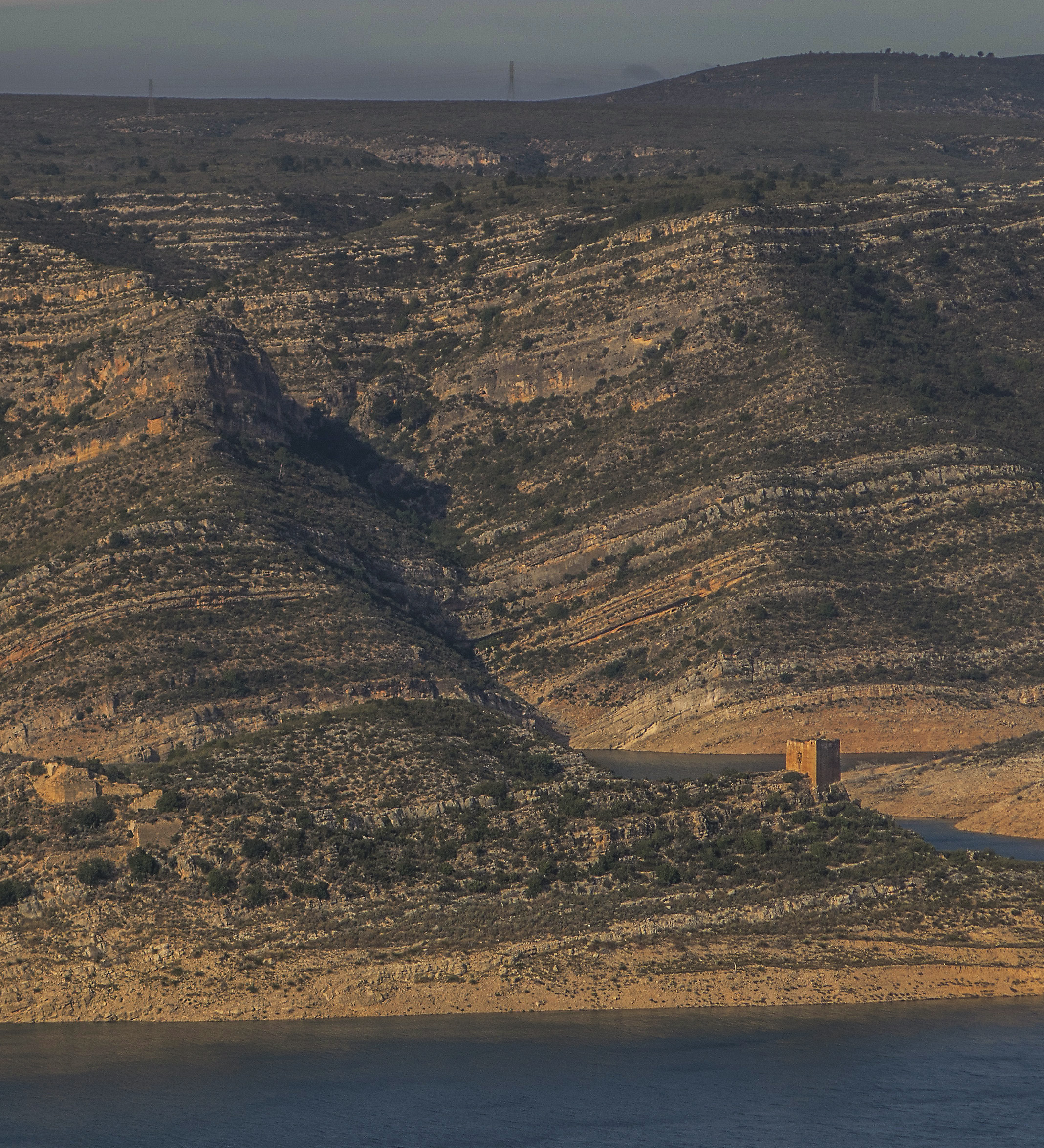 El Castell de Tous ( al costat esquerre de la imatge) és una edificació defensiva medieval del terme de Tous (Ribera Alta), situat a un turó que sobresurt de les aigües de l'embassament de Tous.